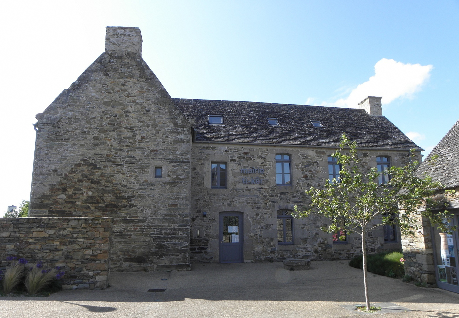 Mairie de Guimaëc (29).